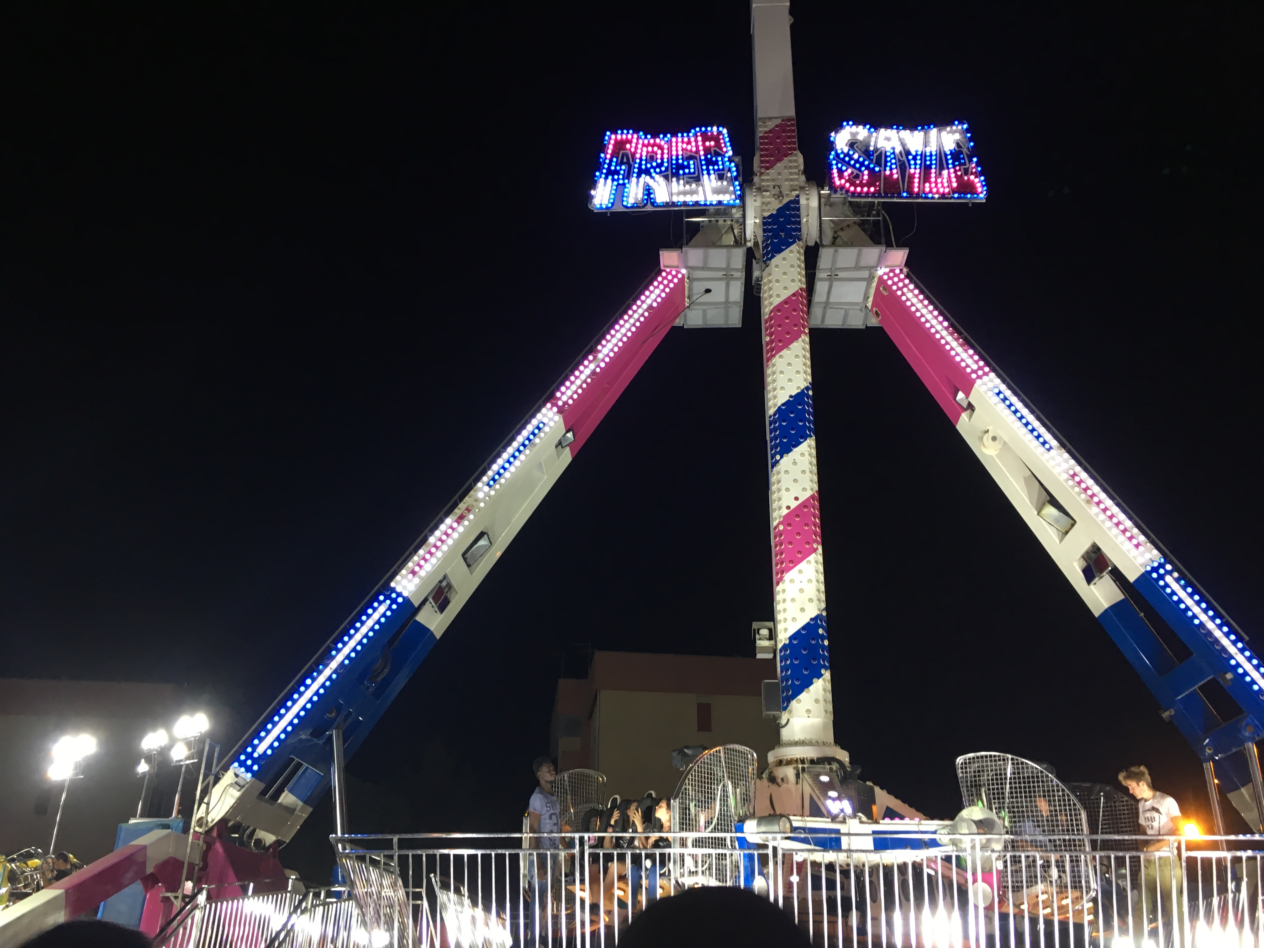 Giostra FreeStyle